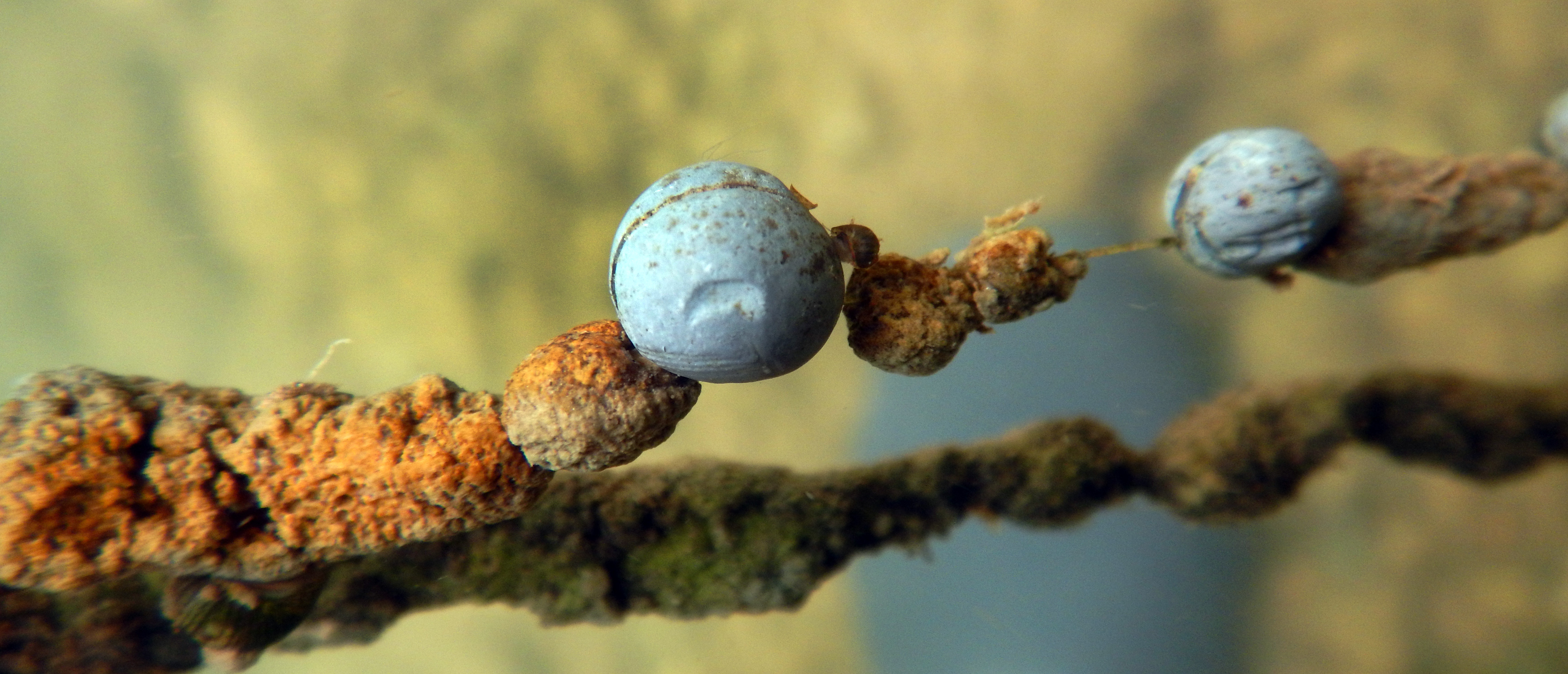 Encroutement algal et/ou bactérien en croissance sur un morceau de fil de pêche cassé, emmêlé et abandonné sur le fond de la rivière "Sèvre niortaise", dans une partie peu profonde et très bien éclairée. Photo faite en août 2016 en amont du pont romain d'Azay-le-Brûlé (France). L'encroutement s'est fait très facilement sur le fil de nylon (jusqu'à plus environ 2 cm d'épaisseur par endroit) et il y adhère bien, alors que les quelques plombs de pêche encore présents sur le fil en sont entièrement préservés en raison de l'extrême toxicité du plomb pour ces organismes. Divers invertébrés, dont des gammares semblent se nourrir sur la surface de l'encroutement et se protéger dans les cavités encore importantes, mais qui finiront par se colmater. Cette section du cours d'eau est riche en zones d'encroutement. Dans ce cours d'eau, selon mes observations, les encroutements les plus denses et importants apparaissent cependant plus généralement sur des tapis de mousses aquatiques (bryophytes) ou de Marchantiophyta.